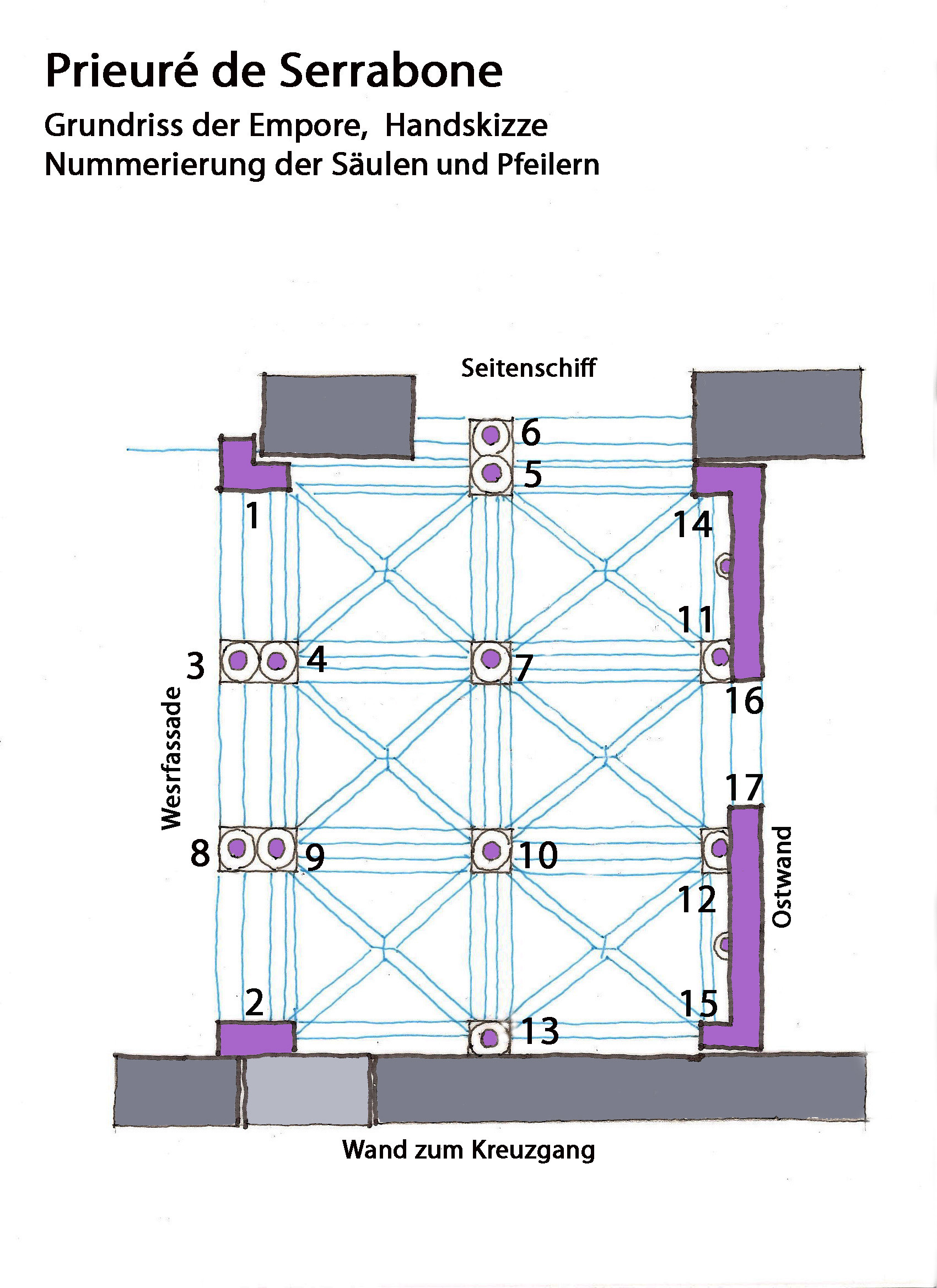 Prieuré de Serrabone, Grundriss der Empore